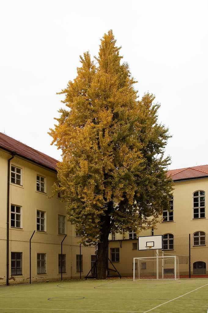 Jinan dvoulaločný na školním dvoře SPŠST v Panské ulici v Praze